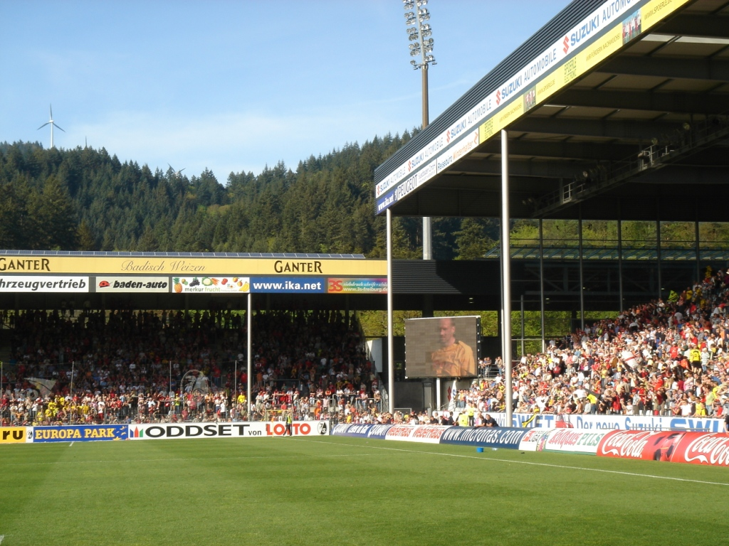 Badenova-Stadion des SC Freiburg Ort: Freiburg im Breisgau